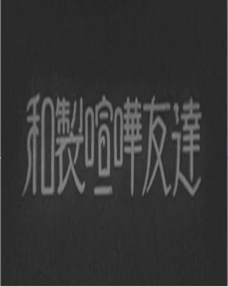 『和製喧嘩友達』、1929年、カットタイトル